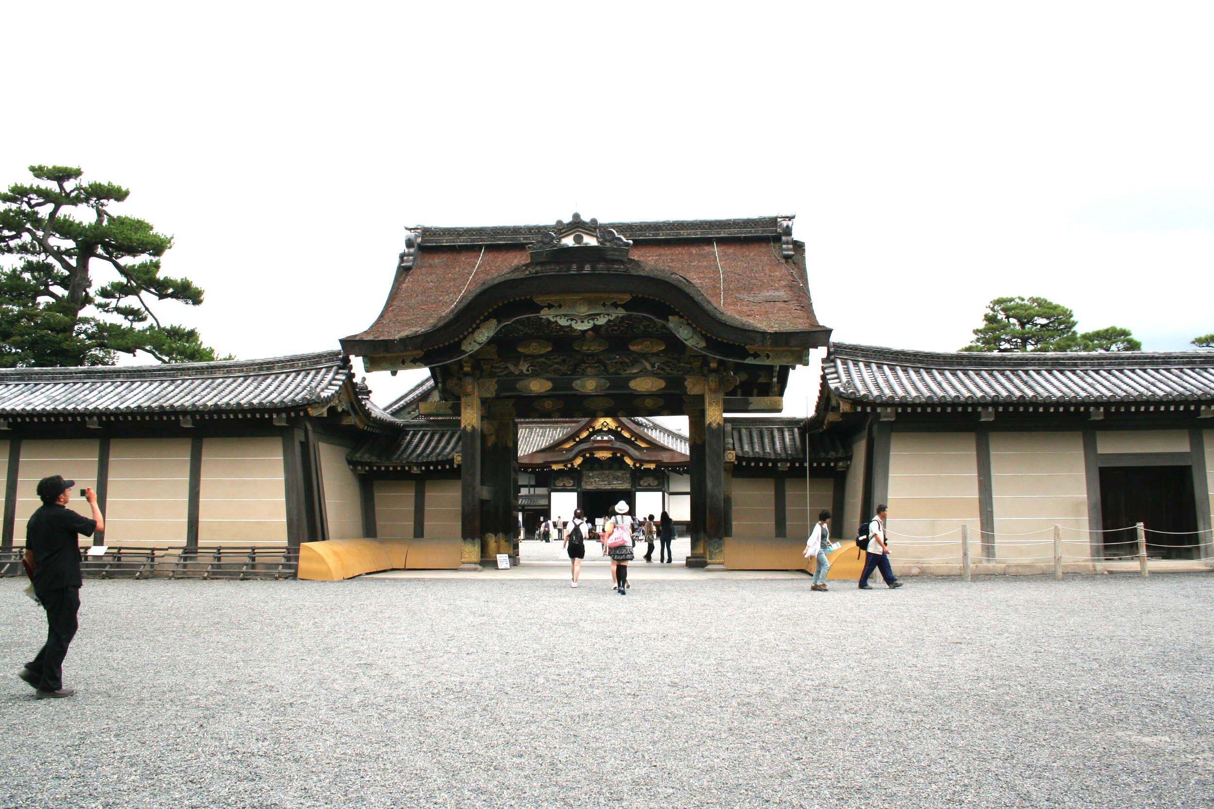 二条城。 二条城の唐門。正面から撮影。